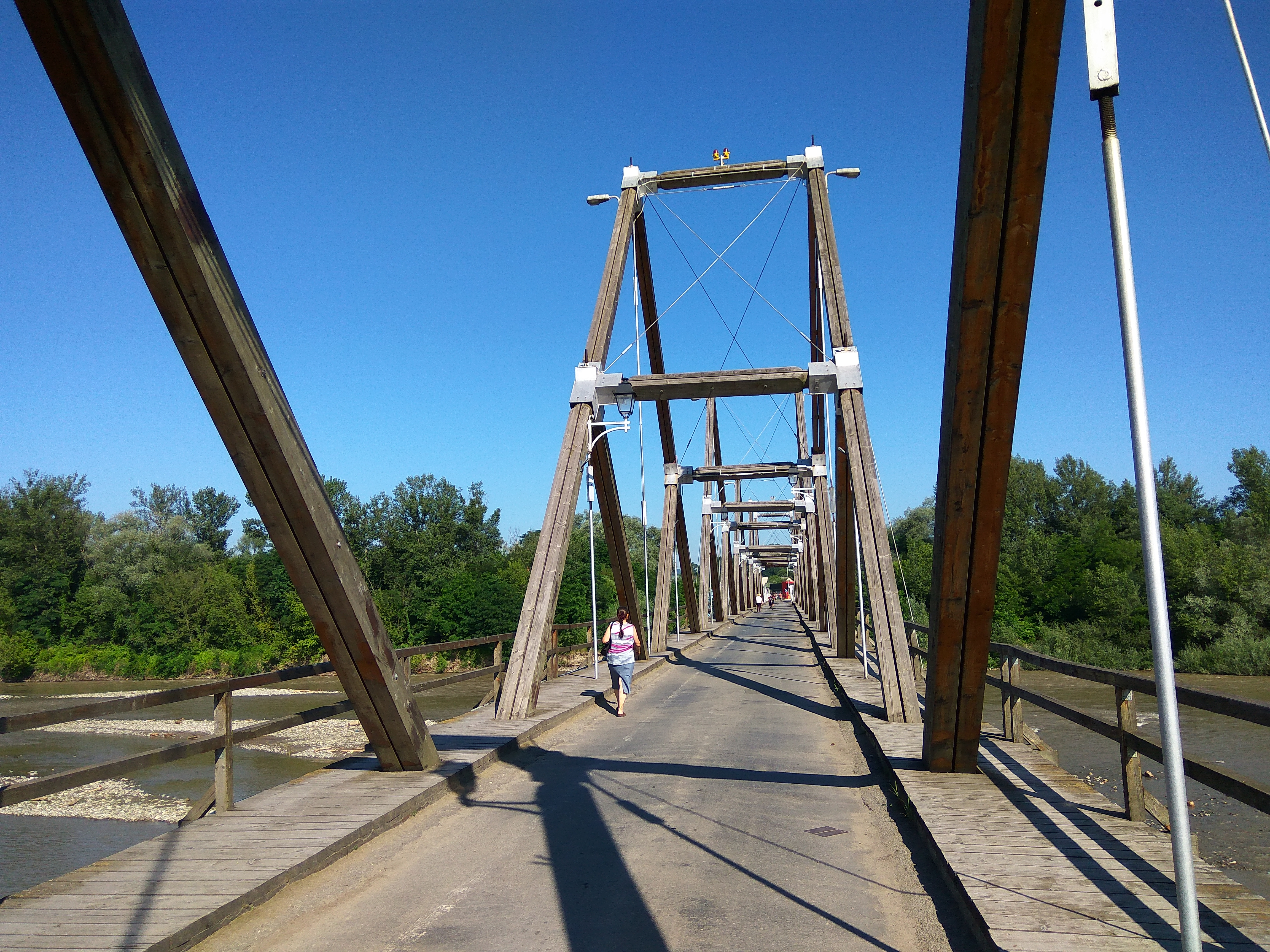 Міст через річку Тиса на кордоні України та Румунії